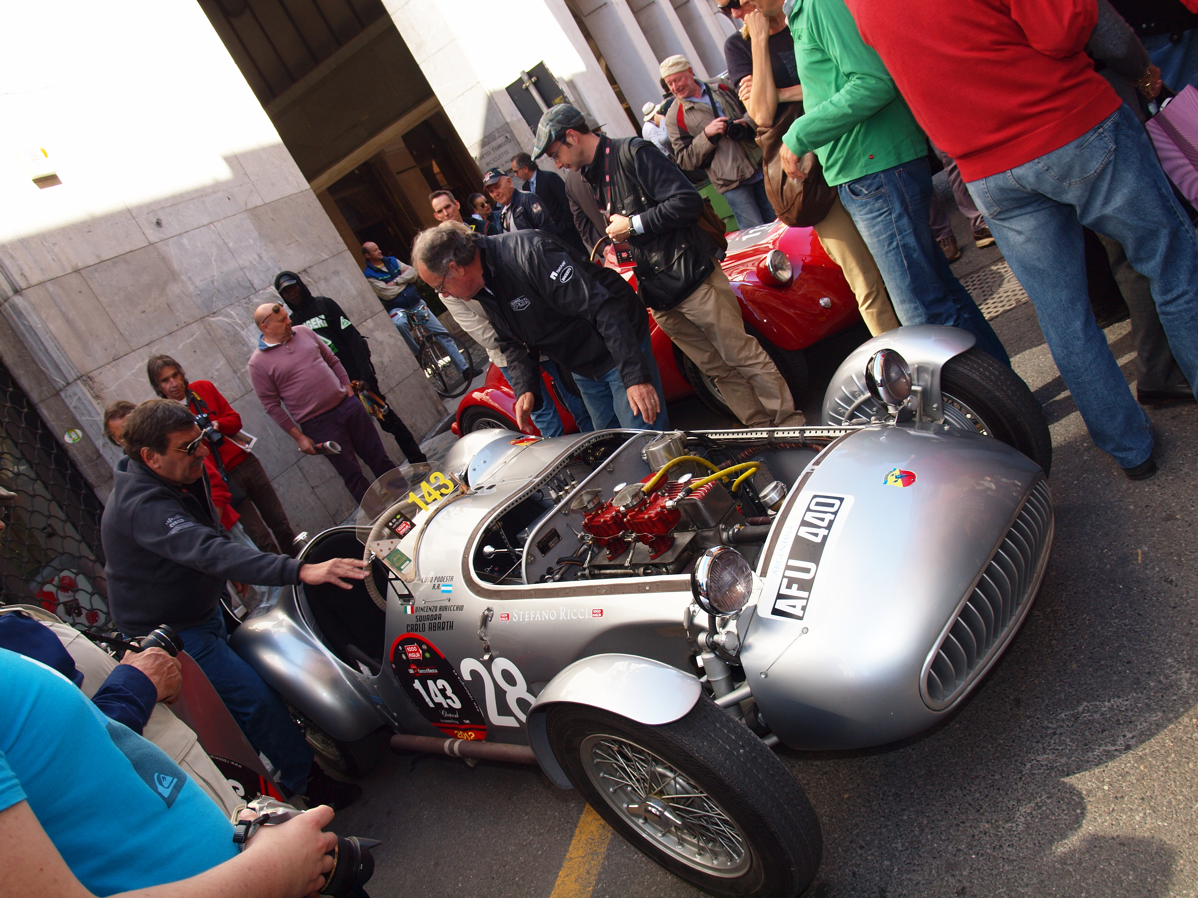 1000 Miglia - Freccia Rossa 2012 Sports ABARTH 204A 1950